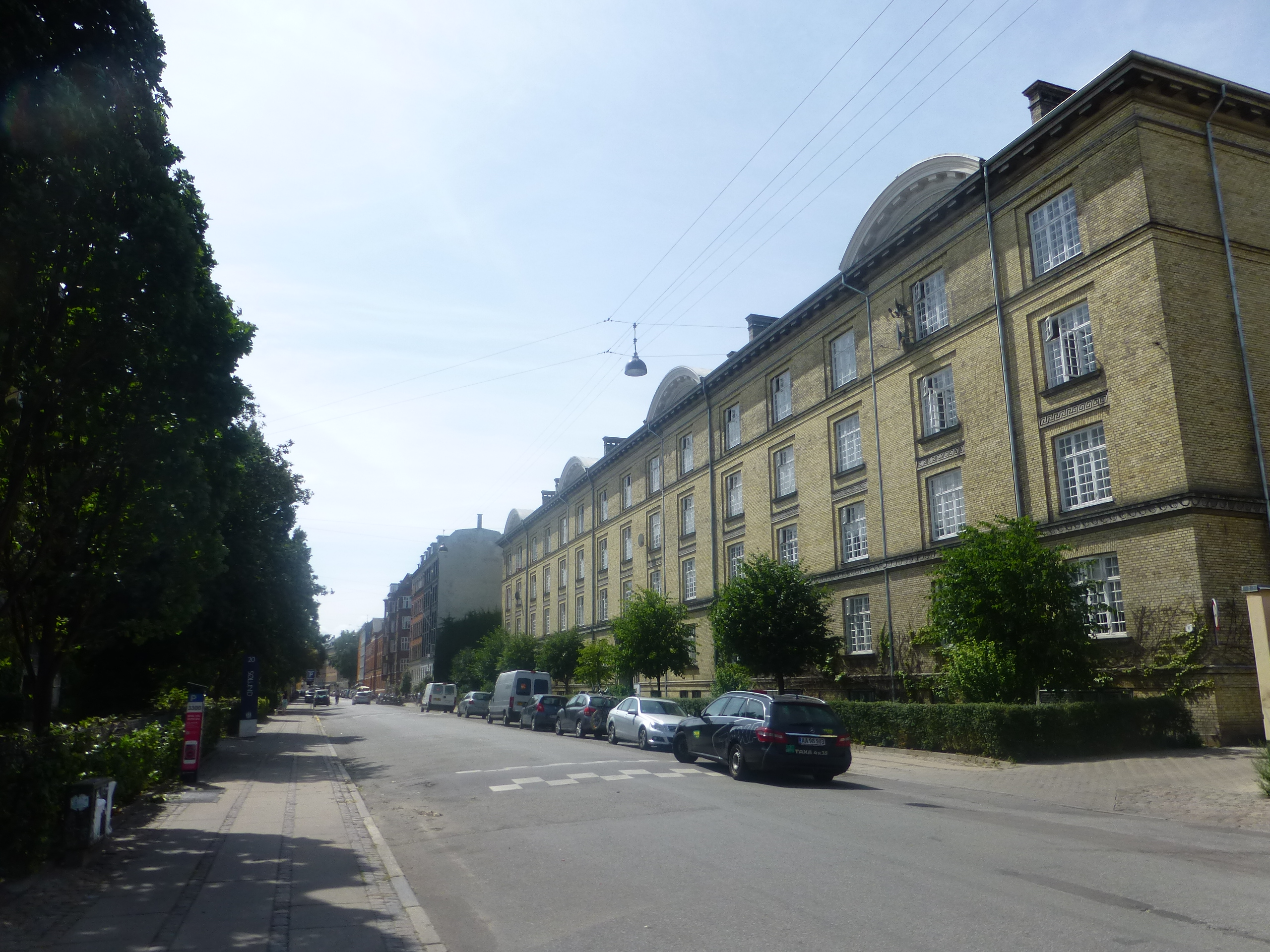 The street Ryesgade in Nørrebro in Copenhagen.